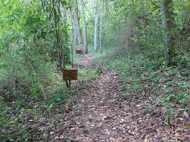 Uno de los árboles de Petencito con el nombre común y científico.